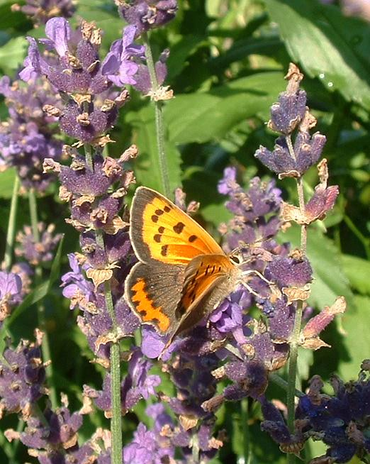 Bronzé, Vantoux-et-Longevelle